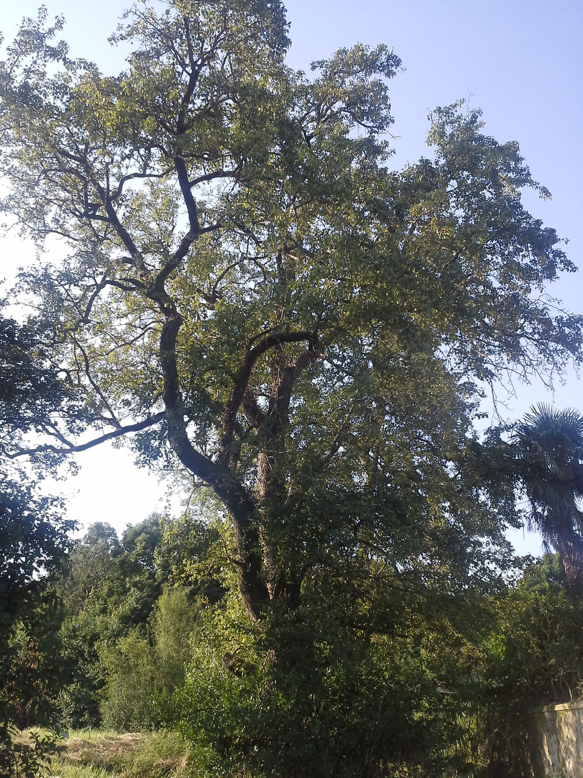 Arbre